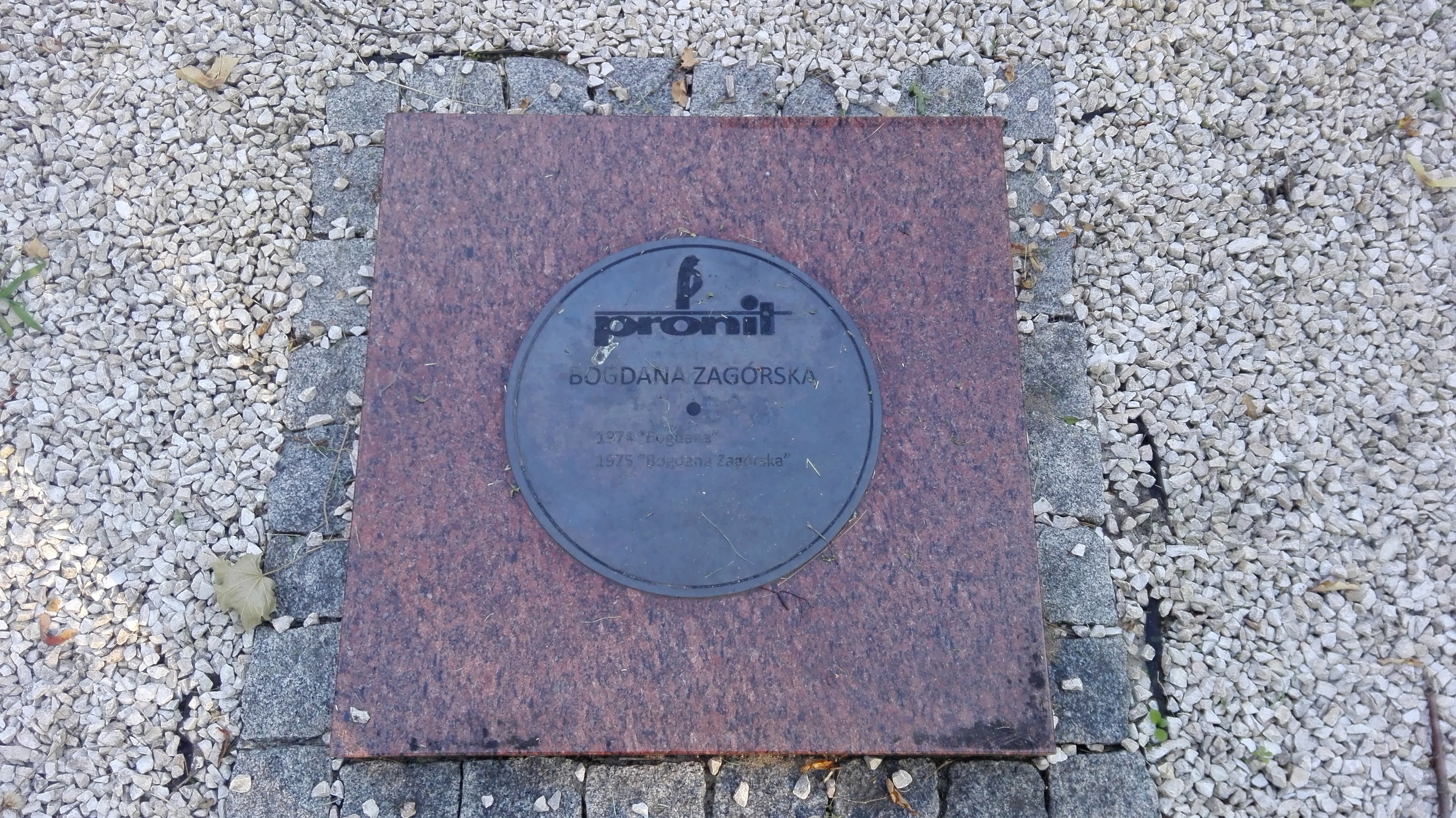 Pionki, w Centrum Aktywności Lokalnej została utworzona Izba Regionalna „Czarnej Płyty”, Bogdana Zagórska.